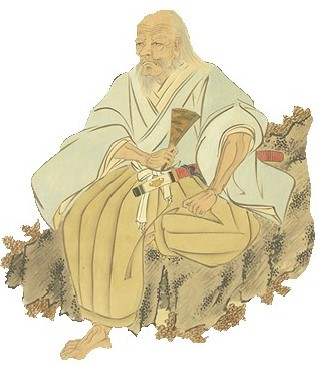 菊池兼朝の肖像。